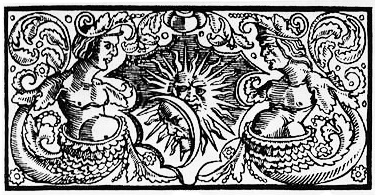 "Русалкі". Выкарыстана 8 разоў: у кнігах "Ісус Навін", "Другі закон", "Юдзіф", "Руф", "Суддзяў", "Эсфір", "Плач Ераміі", "Прарок Данііл". 106Х52/53 мм.